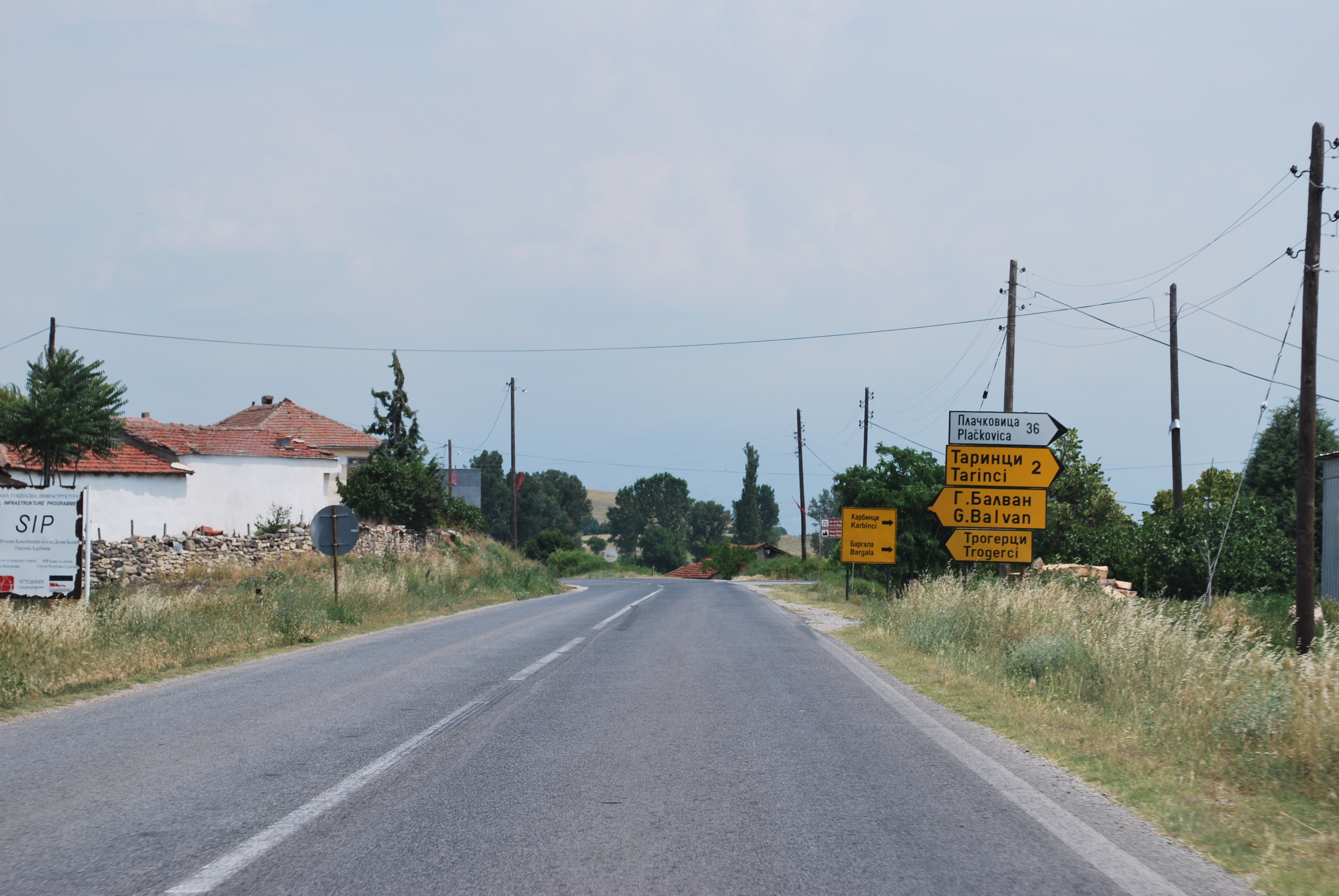 Dolni Balvan, Macedonia